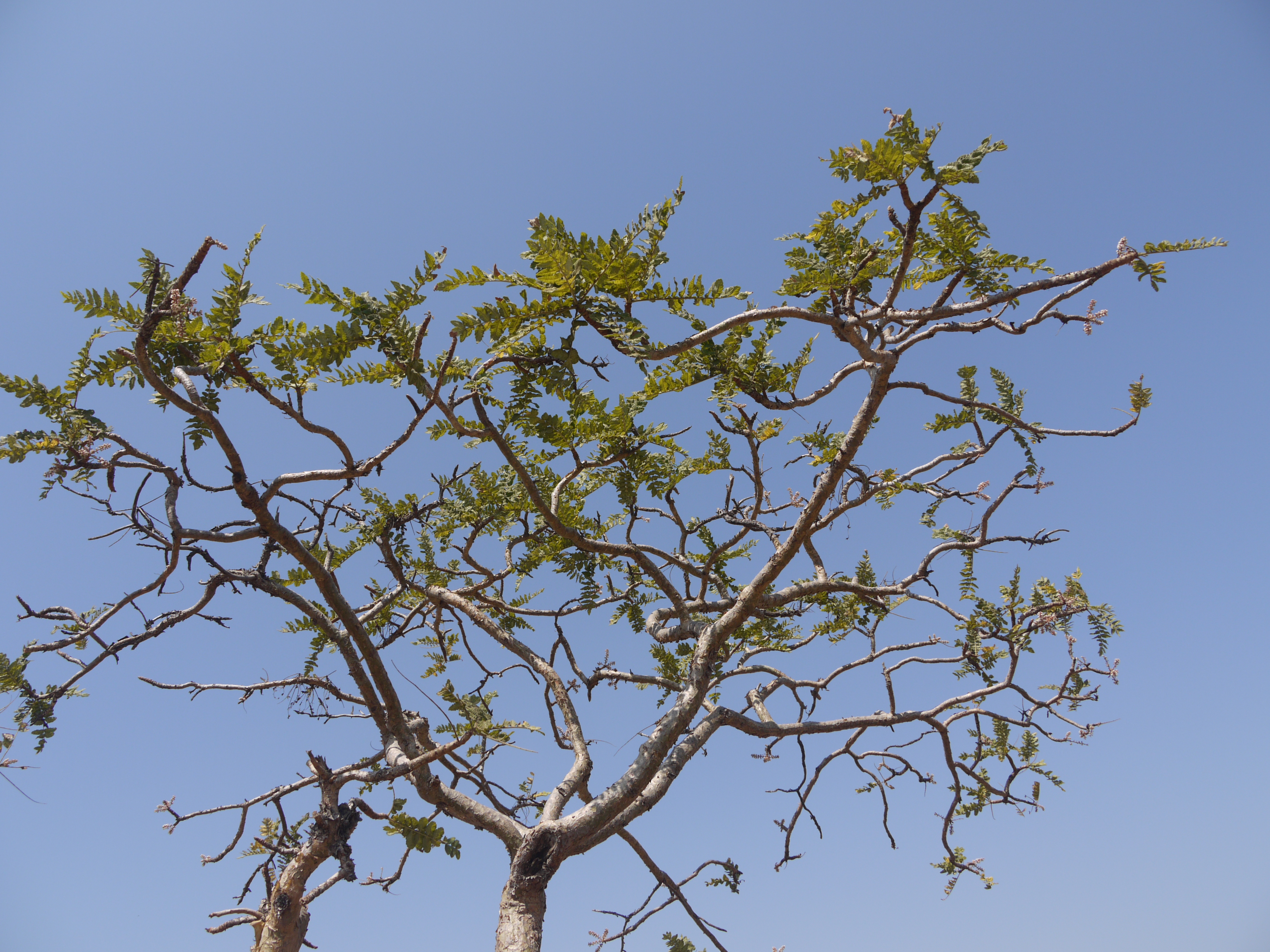 Burseraceae (incense or torchwood family) » Boswellia serrata bos-WELL-ee-a -- named for John Boswell, Scottish botanist and FRCP of Edinburgh sair-AY-tuh or ser-RAT-uh -- toothed like a saw commonly known as: Indian frankincense tree, Indian olibanum tree, salai tree • Gujarati: સાલેડી saaledi, સલાઈ ગૂગળ salaai gugul • Hindi: शल्लकी shallaki • Kannada: ಗುಗ್ಗುಳ ಮರ guggula mara • Malayalam: കുങ്ങില്യം kungilyam • Marathi: धुपाळी dhupali, धूपसाळी dhupasali, कुरुंद kurunda, सालफळी salaphali, साळई salai, साळी sali • Oriya: salai • Pali: सल्लकी sallaki • Punjabi: ਸਾਲ੍ਹੇ salhe, ਸਾਲਹੀ salhi • Sanskrit: भीषण bhishan, गुग्गुल guggula, हस्तिनशना hastinashana, पालंक palank, पार्वती parvati, ऱ्हादिनी hradini, कुरुन्द kurunda, सल्लकी sallaki, शल्लकी shallaki, स्रुवा sruva • Tamil: குமஞ்சம் kumancam, குங்கிலியம் kunkiliyam, மரத்துவெள்ளை marattu-vellai, பறங்கிச்சாம்பிராணி paranki-c-campi-rani, வெள்ளிக்கீரை vellai-k-kirai • Telugu: గుగ్గిలము guggilamu, పరంగిసాంబ్రాణిచెట్టు parangi-sambrani-chettu, సల్లకి sallaki ... the resin obtained from this tree is commonly known as: Indian olibanum, Indian frankincense, Konkani resin • Arabic: لبان luban • Hindi: कुंदर kundar, लोबान loban, मकन्द makand, मकुन्द makund • Kannada: ಚಿಲಕದೂಪ chilakadupa, ಧೂಪ dhupa, ಗುಗ್ಗುಳ guggula, ಹಾಲು ಮಡ್ಡಿ haalu maddi, ಲೋಬಾನ lobaana, ಪರಮ್ಗಿ ಸಾಮ್ಬ್ರಾಣಿ paramgi saambraani • Konkani: लोभान lobhan • Marathi: लोभान lobhan • Persian: گنده فيروزه gandha firoza, لوبان loban • Punjabi: ਲੋਬਾਣ loban • Sanskrit: द्विज dvija, कुन्दुर kundur, कुन्दुरु kunduru, मुकुन्दः mukundah, पालंकी palanki, पालंक्या palankya, सुरभी surabhi, तुरुष्क turushka • Telugu: కుందురువు kunduruvu • Urdu: لوبان loban Endemic to: India References: Flowers of India • NPGS / GRIN • DDSA